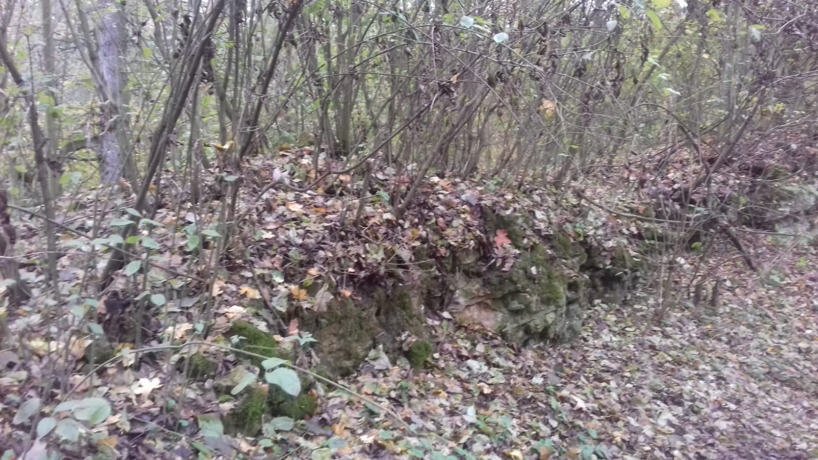 Pozůstatek hradem zříceniny Mydlovar